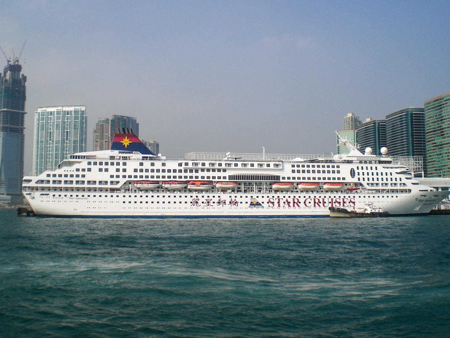 麗星郵輪SuperStar Aquarius寶瓶星號, 海運大廈Ocean Terminal, Hong Kong